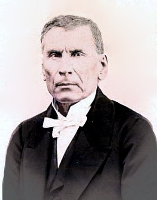 Fotografía coloreada de Santiago Vidaurri